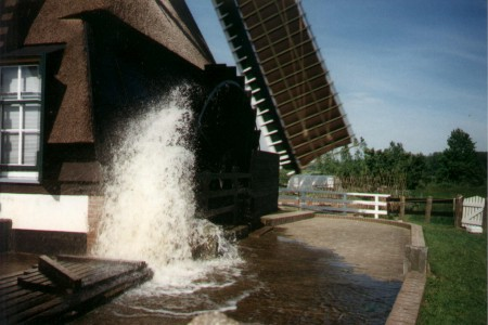 Open scheprad in actie (Bonkmolen in Meerkerk)